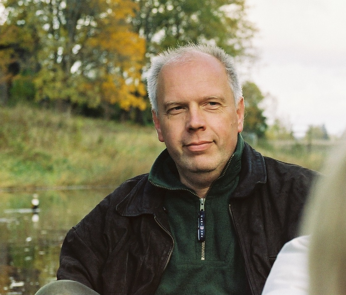 Arne Ader 2003. aastal Soomaal fotolaagris